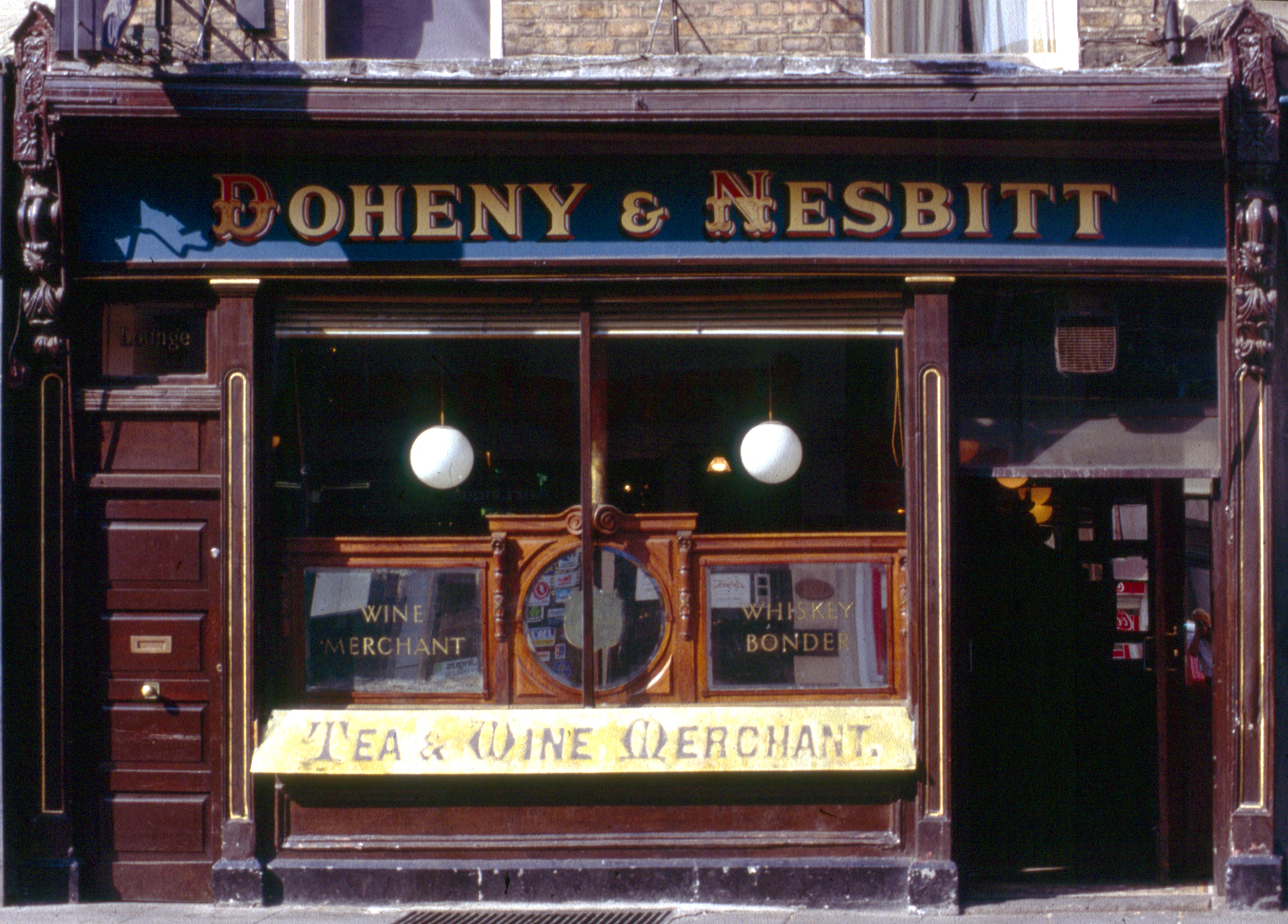 1989 in Dublin